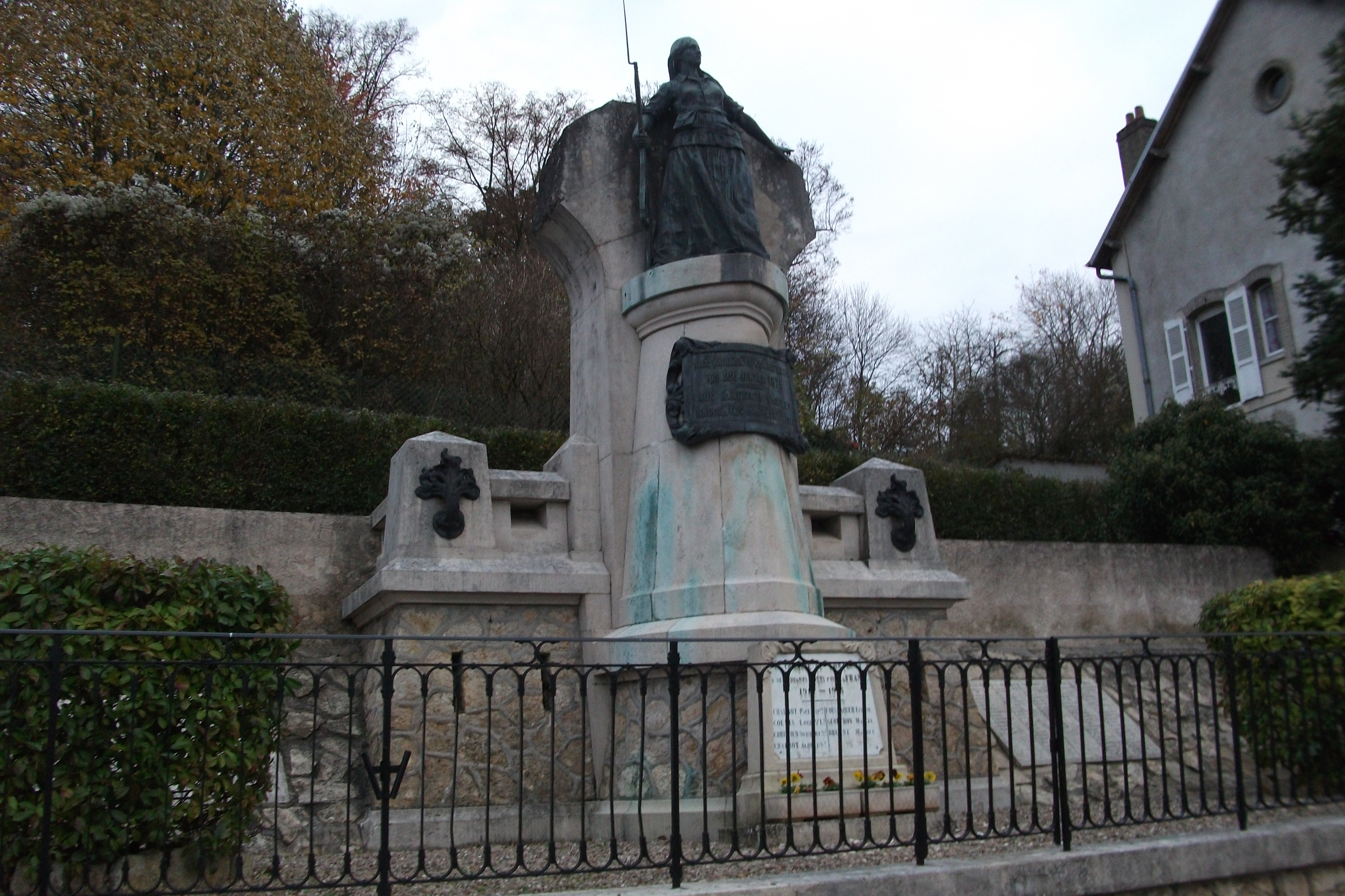 Monument aux morts de Fontenoy sur Moselle, 1871, 1914-1918, 1939-1945.